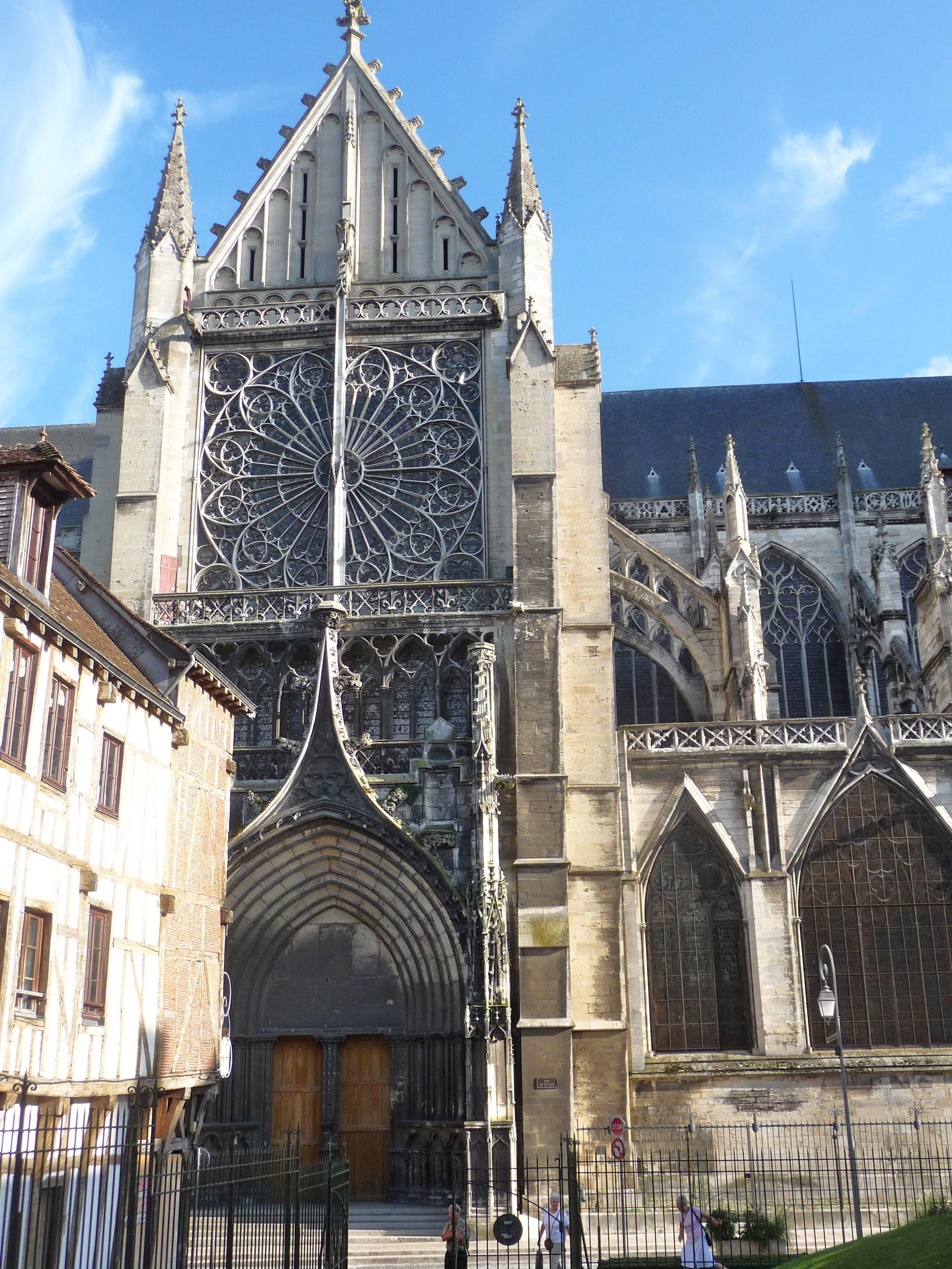 Le transept nord-ouest orné d'une rosace. .